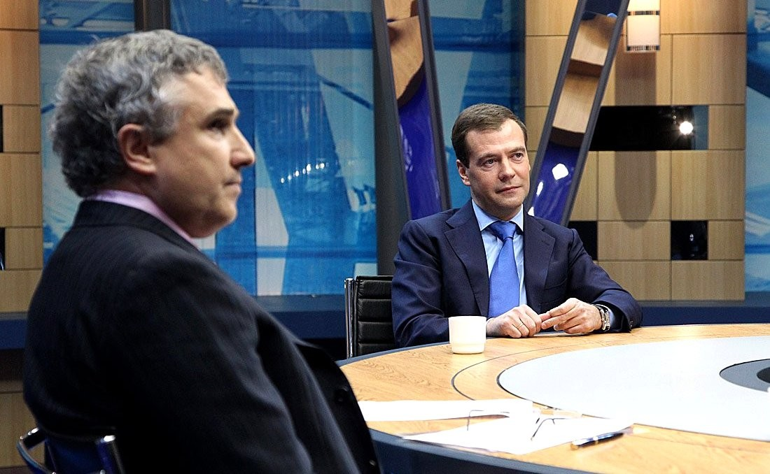 Дмитрий Медведев, Владимир Кулистиков